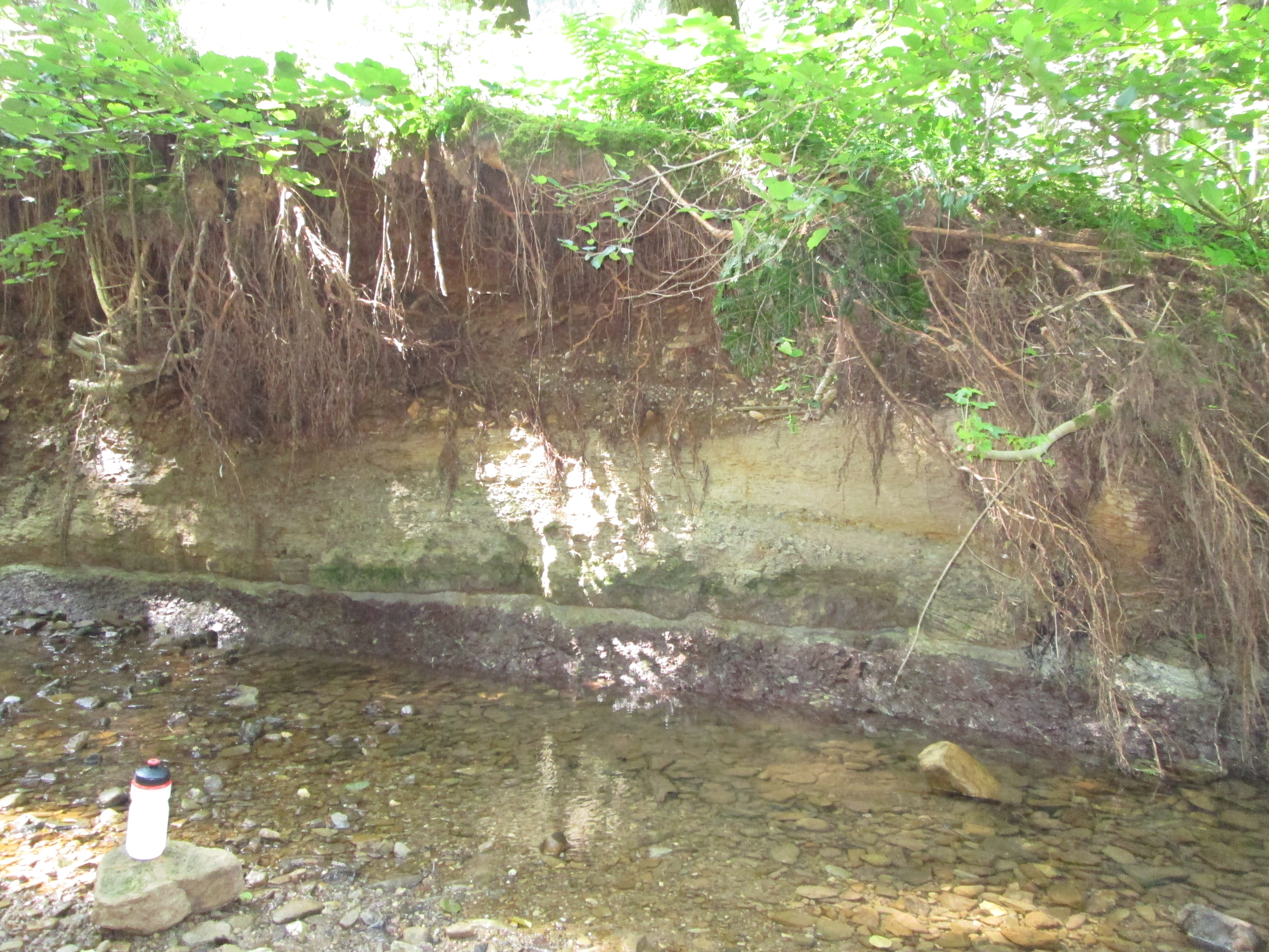 Tiefenbach (Rems). Links unten Trinkflasche zum Größenvergleich